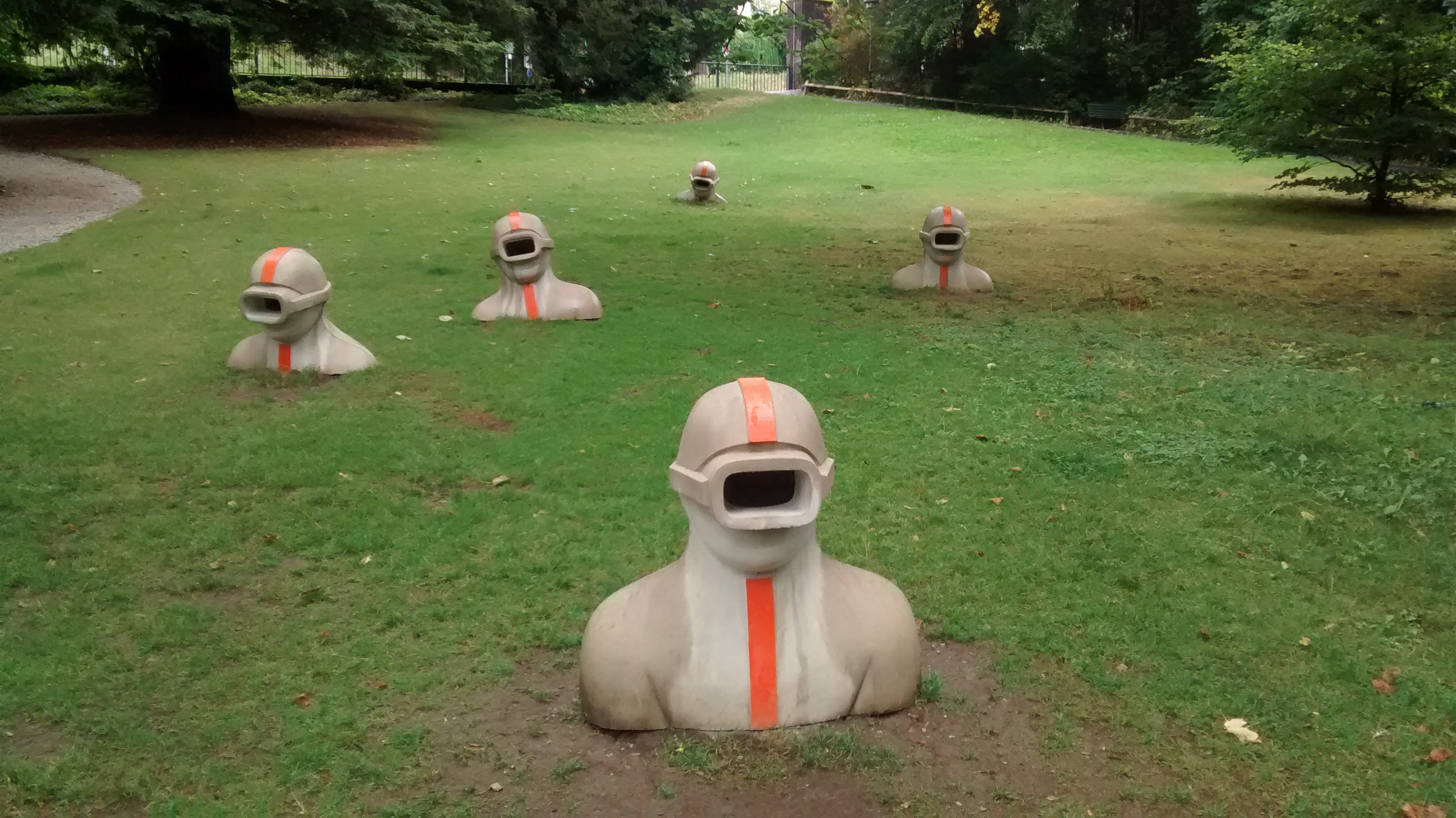 Plongeurs terrestres par Max Grüter au Parc de Mon Repos Lausanne